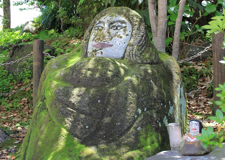 亀寿（ジメサア）